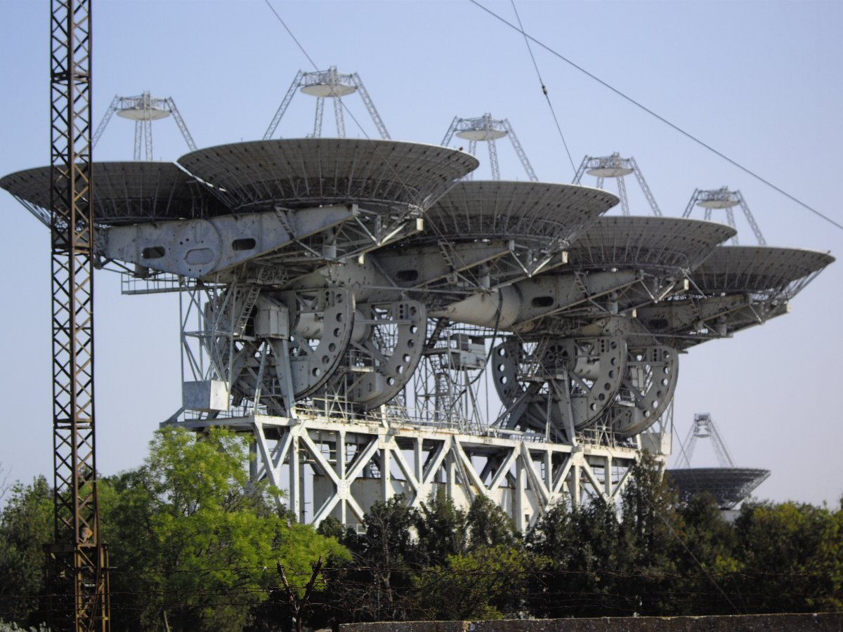 приемная антенна АДУ-1000